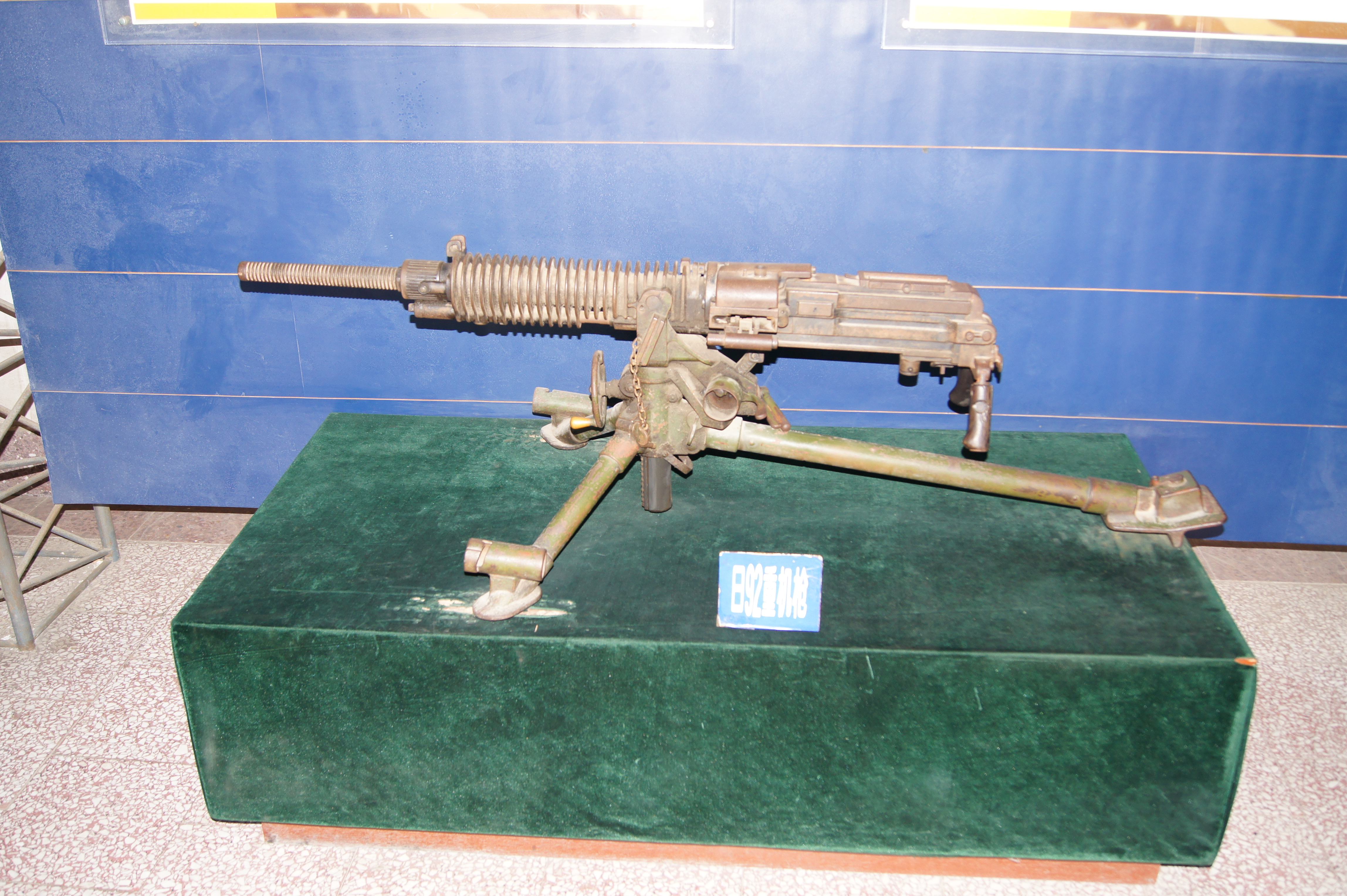 九二式重機関銃、大連市ja:旅順口区海軍博物館内に展示されている物。詳細は不明だが、中国大陸で鹵獲された物である可能性が高い